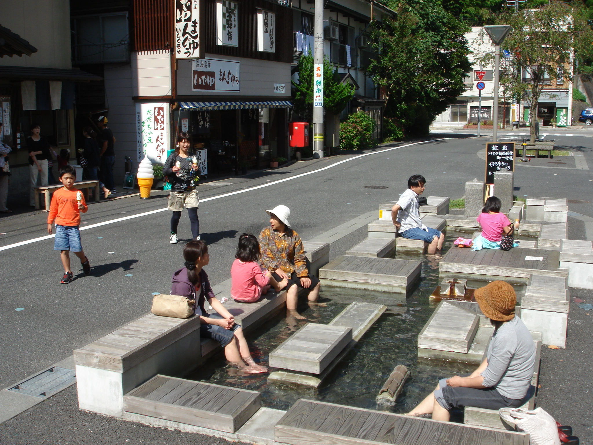 あつみ温泉の足湯